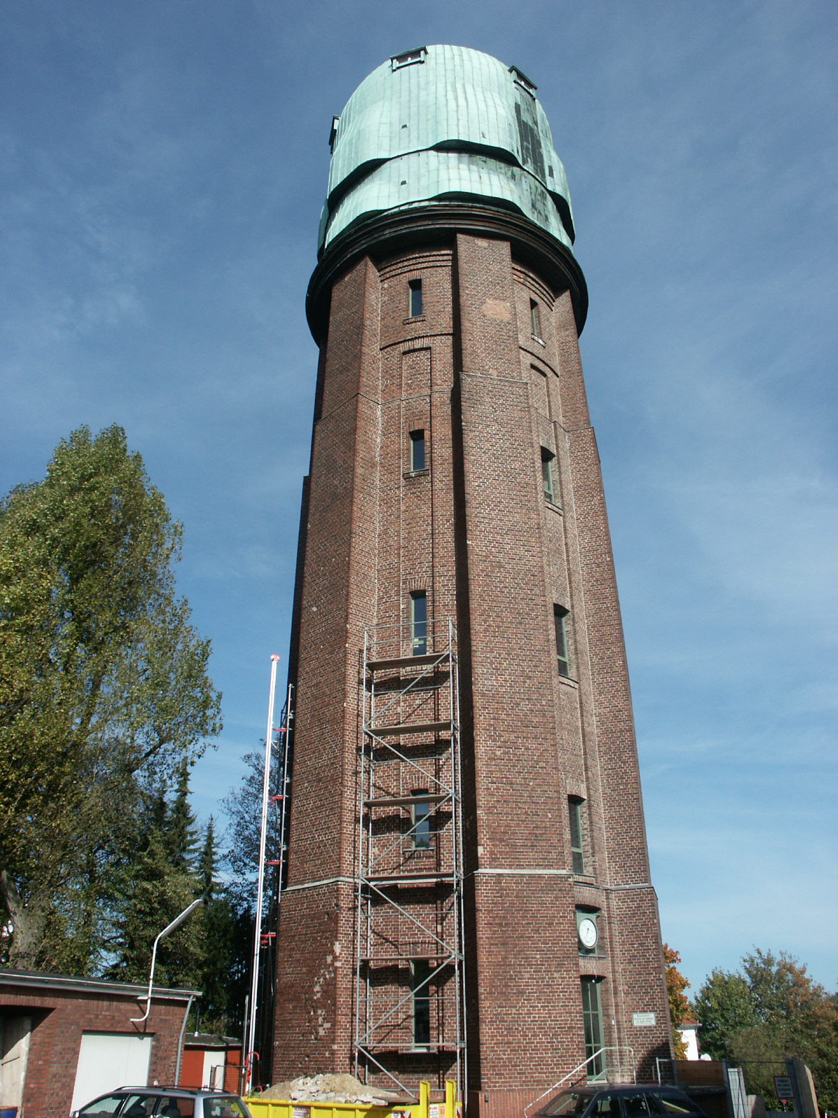 52146 Würselen-Bardenberg, Niederbardenberger Straße 1. Der weithin sichtbare Wasserturm aus Backstein erreicht eine Höhe von 47m. Die Dachabdeckung besteht aus vorpatiniertem Kupferblech. Aufnahme von 2004.